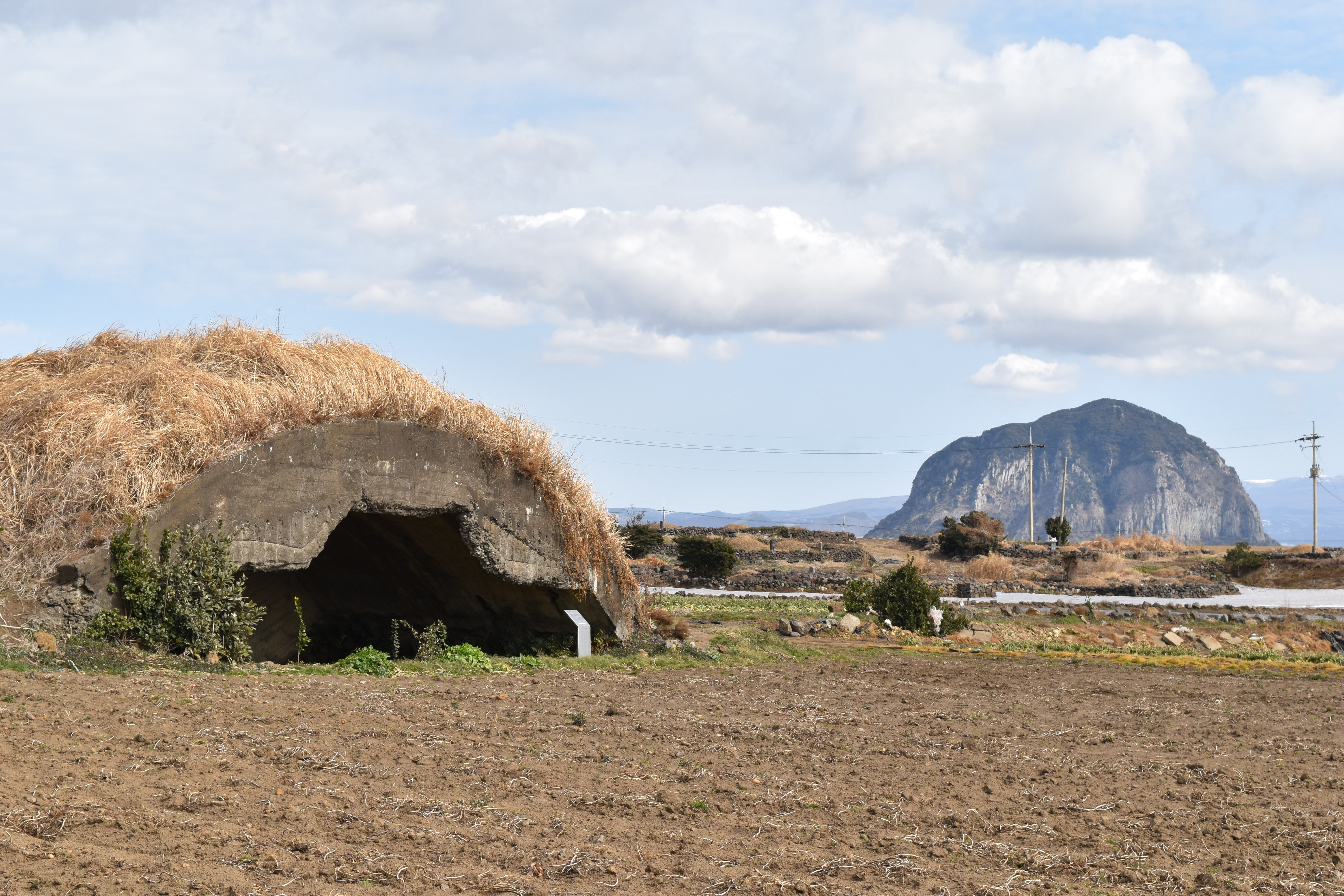 알드르 비행장 지하 벙커 격납고